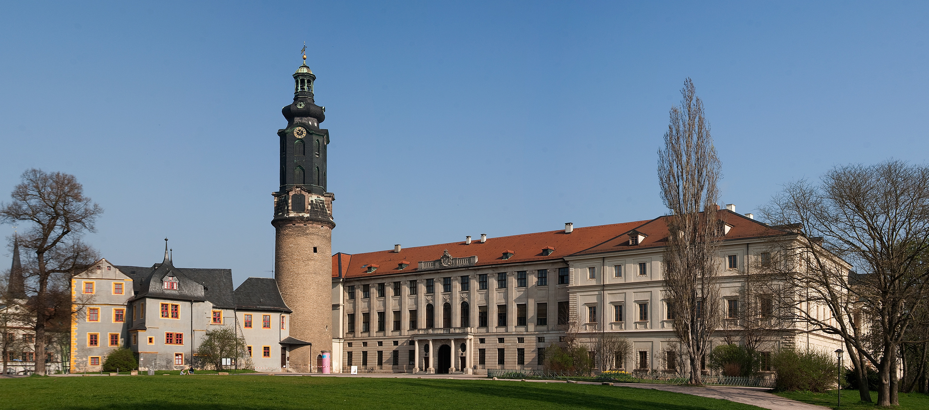 Weimarer Stadtschloss (auch Residenzschloss) - Panorama 50°58′49.1″N 11°19′55.6″E / 50.980306°N 11.332111°E